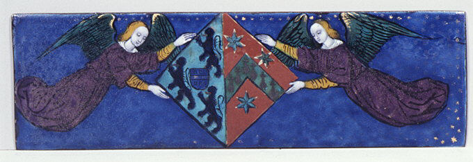 French, Limoges; Panel; Enamels